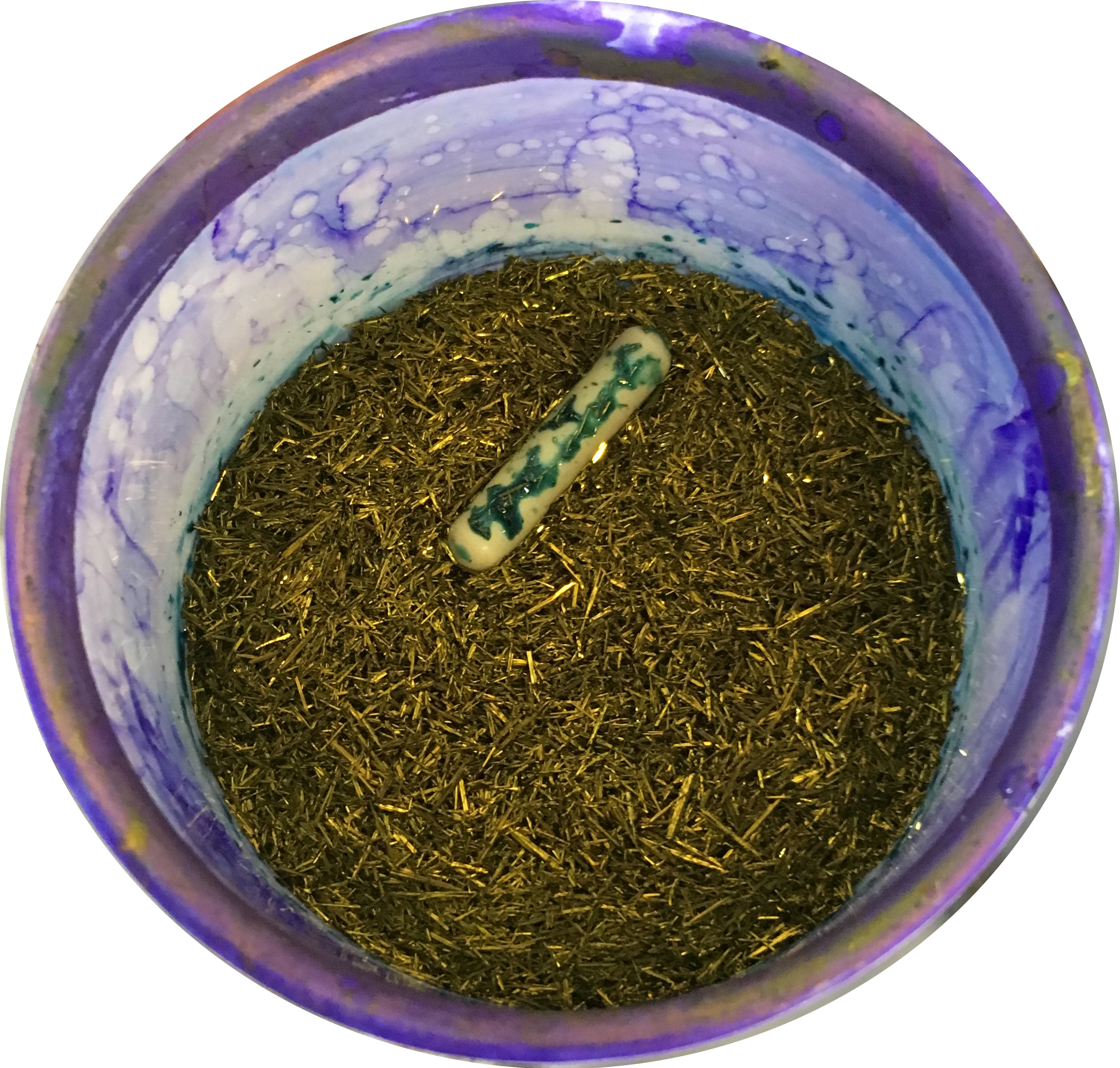 Aus Wasser umkristallisierte Kristallviolett-Nadeln mit gold-grünlichem, metallischem Glanz